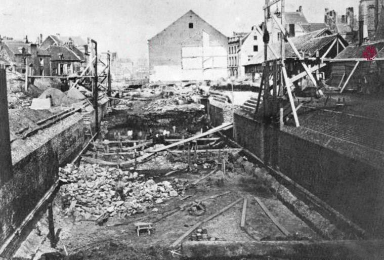 Voûtement de la Senne au niveau de la Place Fontainas